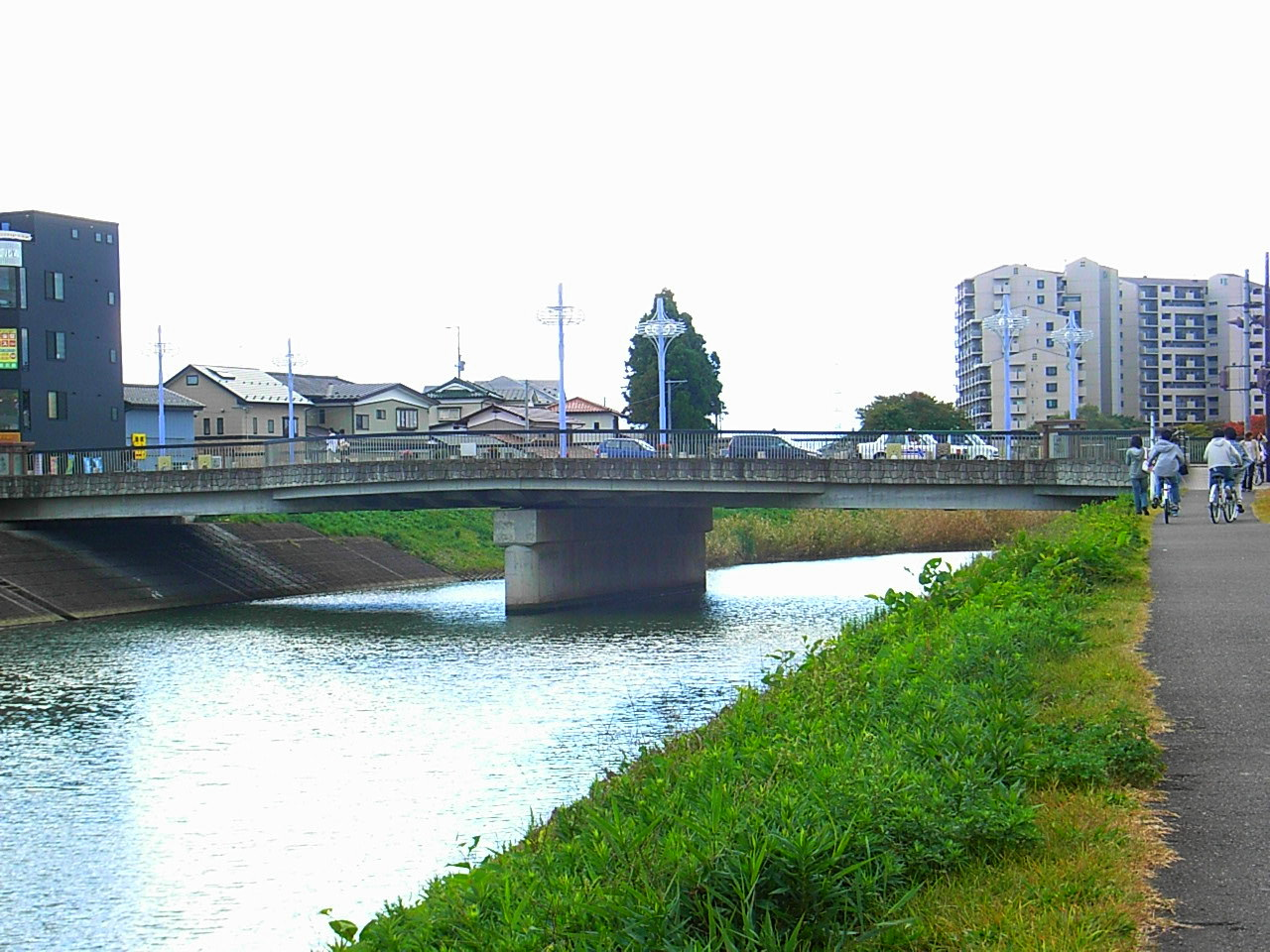 Sunaoshi River. Tagajō, Miyagi prefecture, Japan.